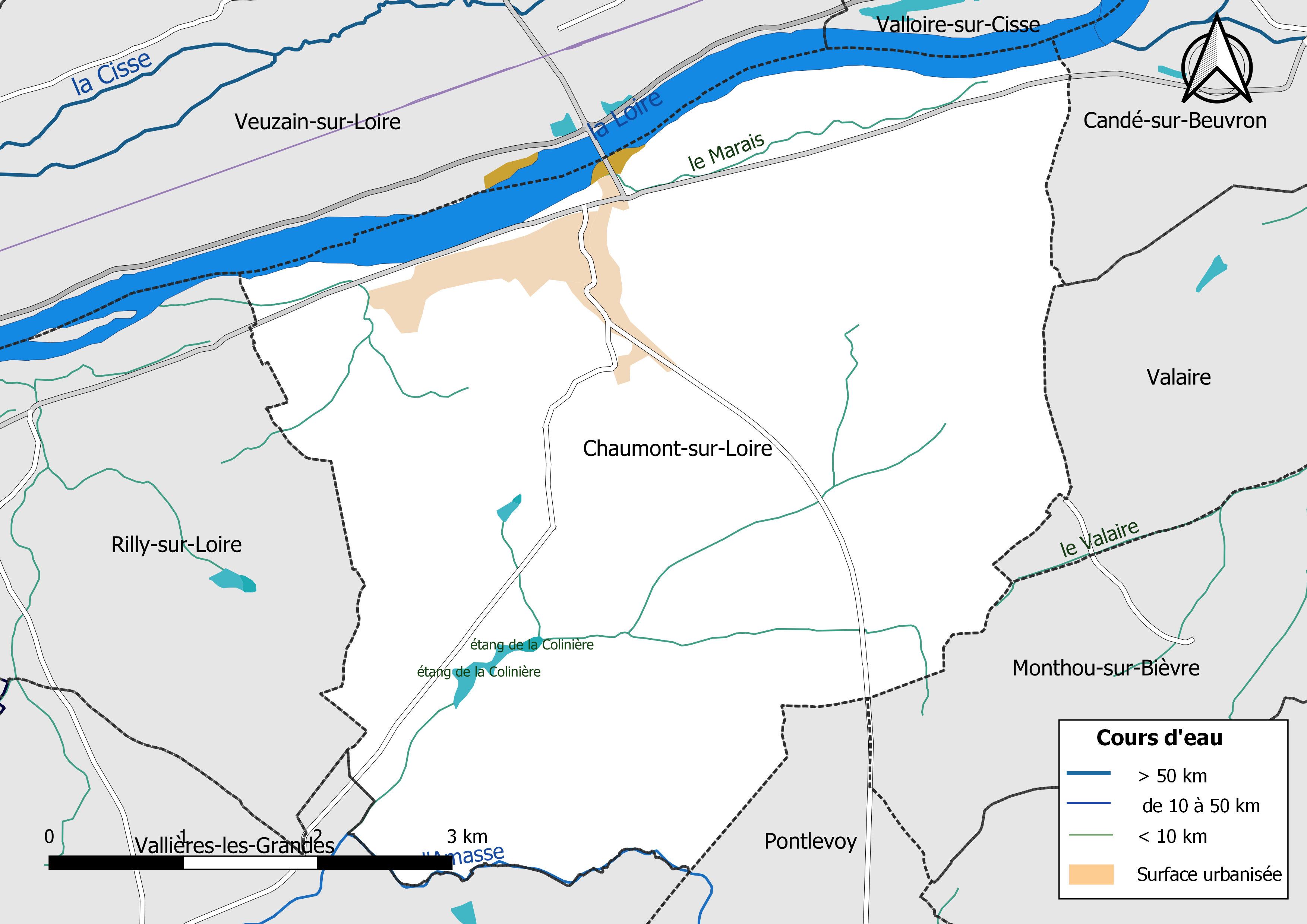 Carte du réseau hydrographique de la commune de Chaumont-sur-Loire (Loir-et-Cher, France).